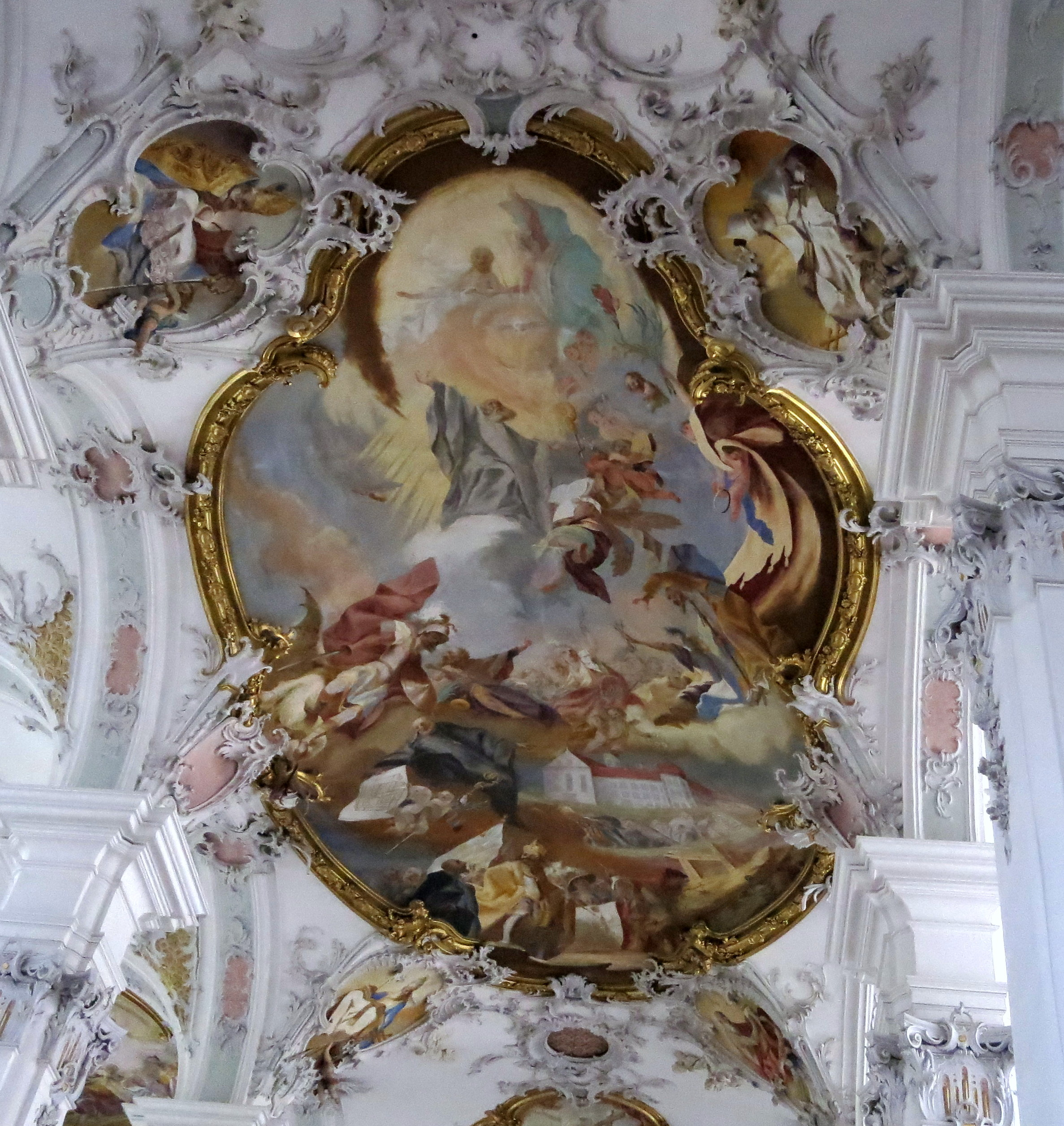 Deckenfresko